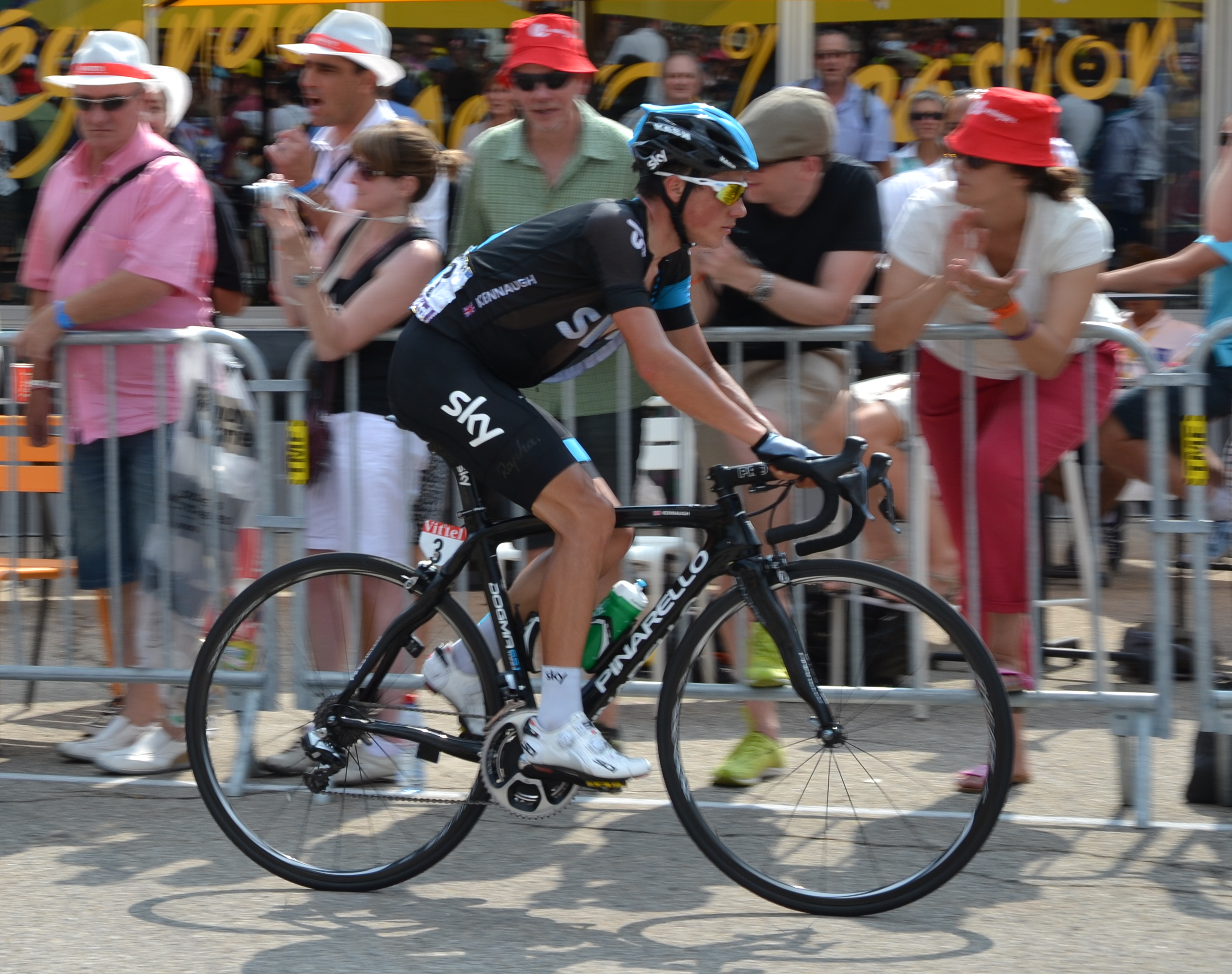 Au Chalet Reynard, lors de la 15ème étape du Tour de France 2013